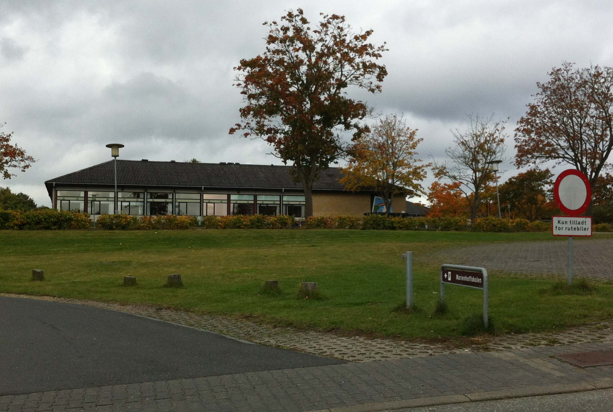 Marienhoffskolen i Ryomgård